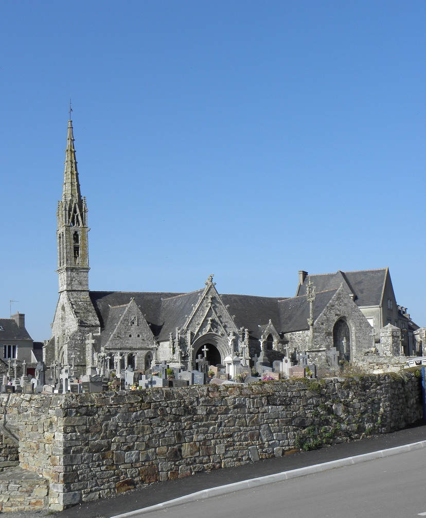 Église Saint-Nicaise à Saint-Nic (29).